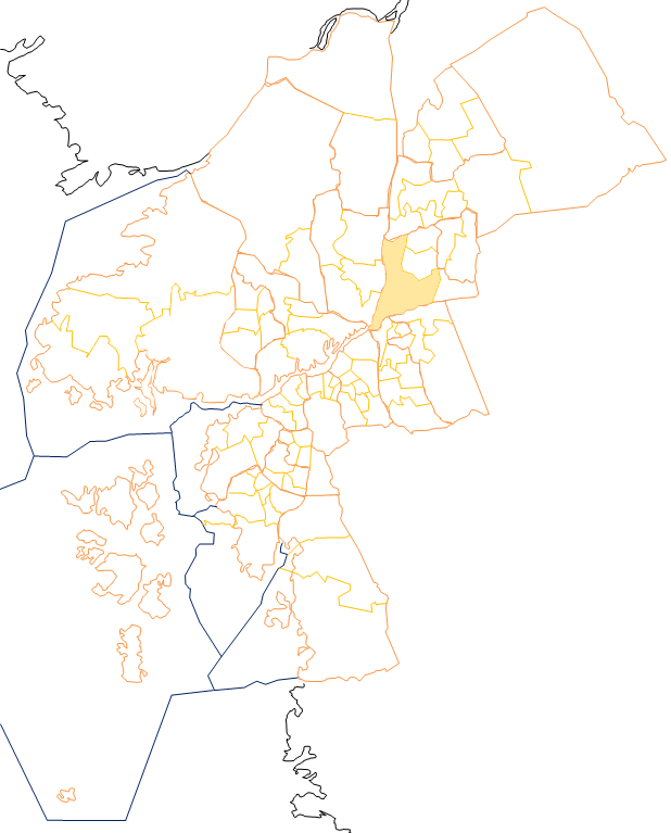 Karta som visar primärområdes belägenhet i Göteborg